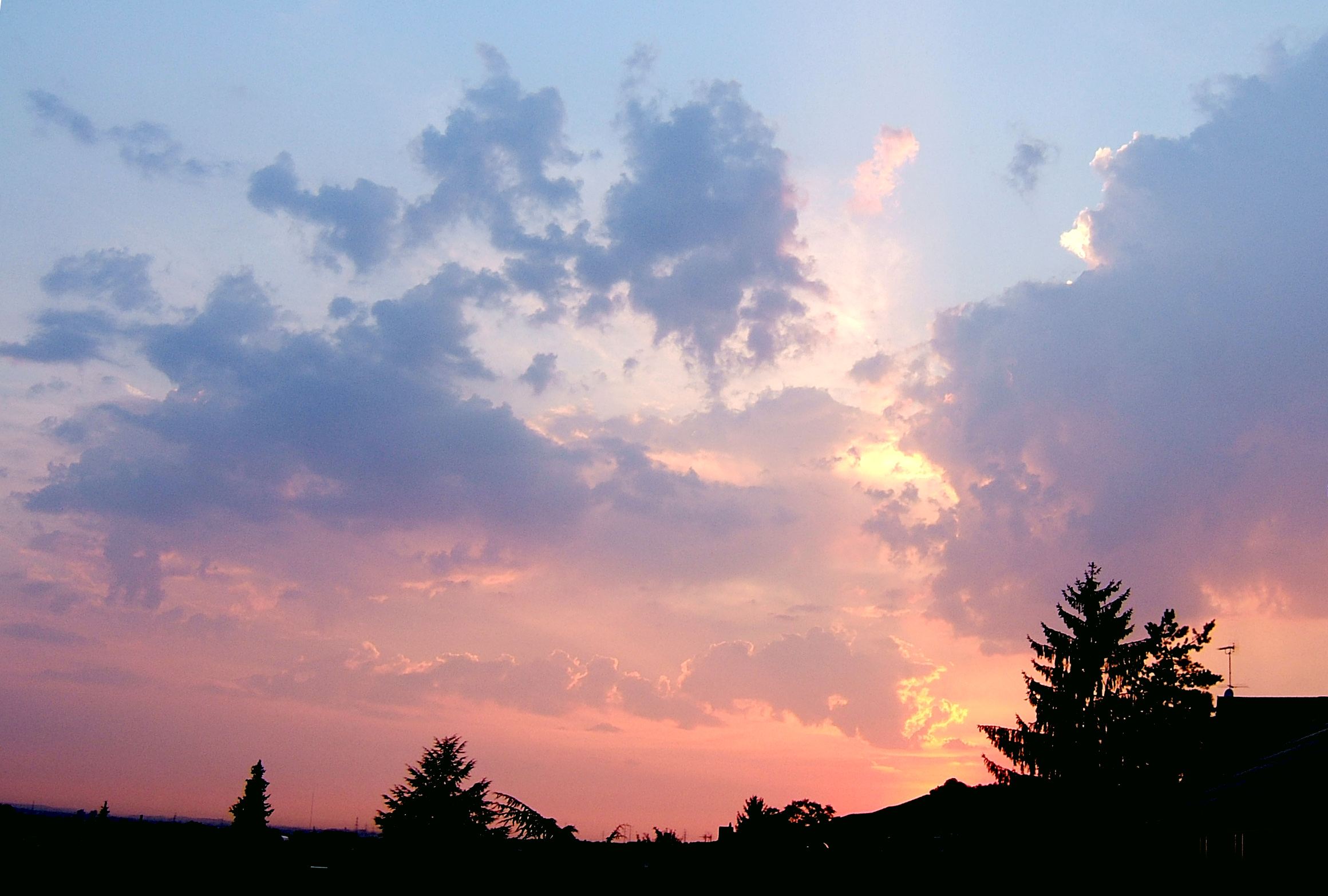 Evening sky above Rems Valley, Baden-Württemberg, Germany.